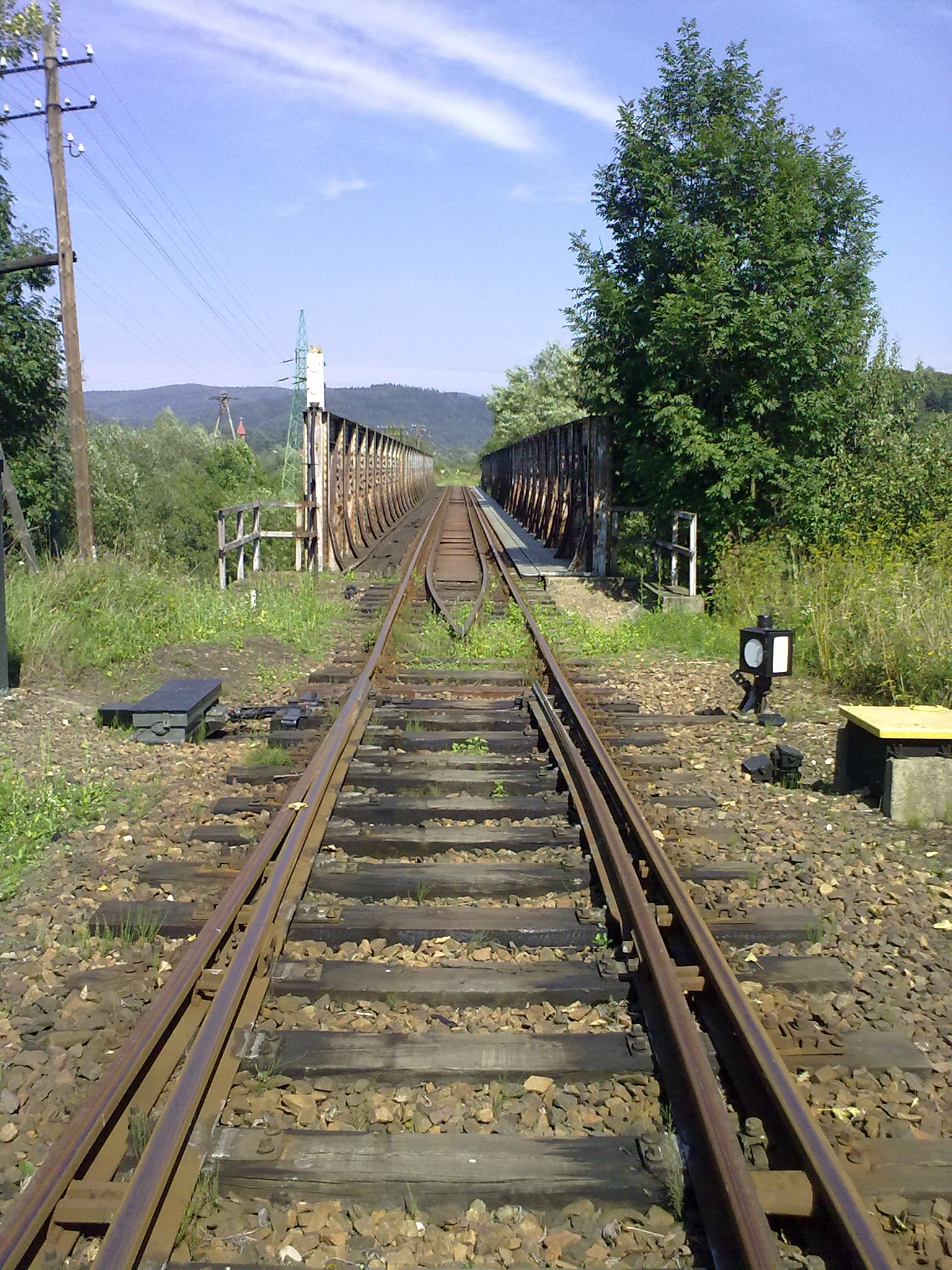 Most kolejowy na linii 108 Stróże - Krościenko w miejscowości Zagórz, rzeka Osława.